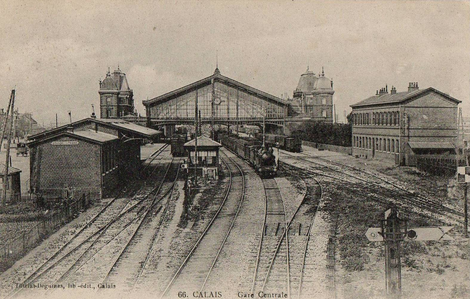 Carte postale ancienne éditée par Thiriat-Deguines, libraire éditeur à Calais, n°66 :Calais - Gare Centrale.(faisceau de voies et ancienne marquise de la gare de Calais-Ville).